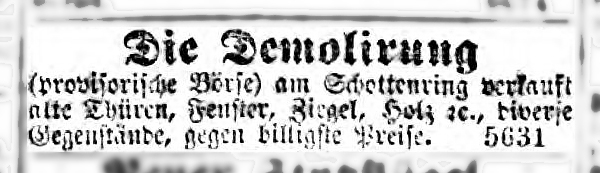 Wien-Innere Stadt, Schottenring 19, Provisorische Börse, Demolierung, Annonce 1877